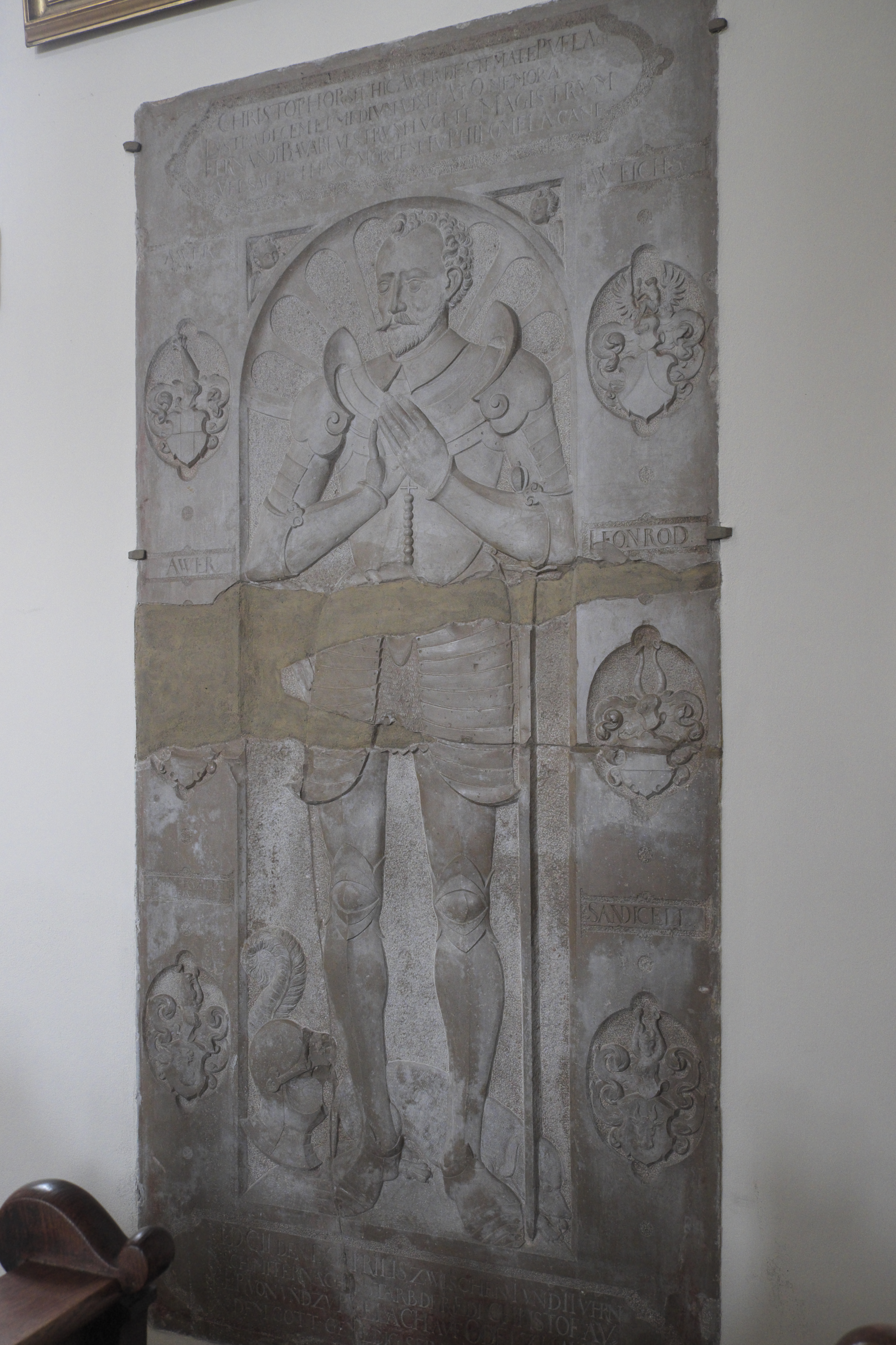 Katholische Pfarrkirche St. Benedikt in Odelzhausen im Landkreis Dachau (Bayern/Deutschland), Epitaph